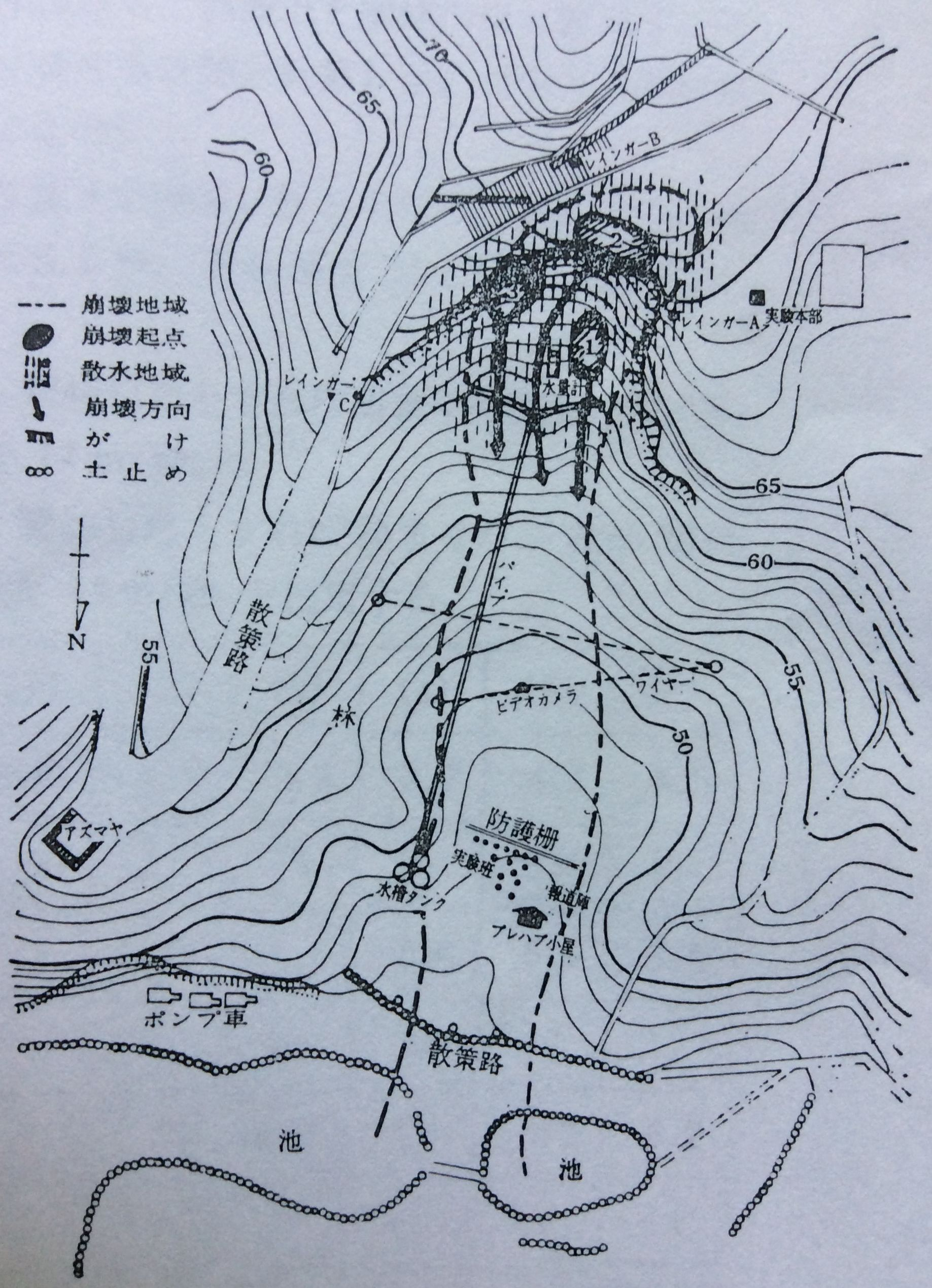 生田緑地 川崎ローム斜面崩壊実験事故